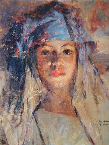 Portrait de femme de Bou-Saada. Huile sur toile